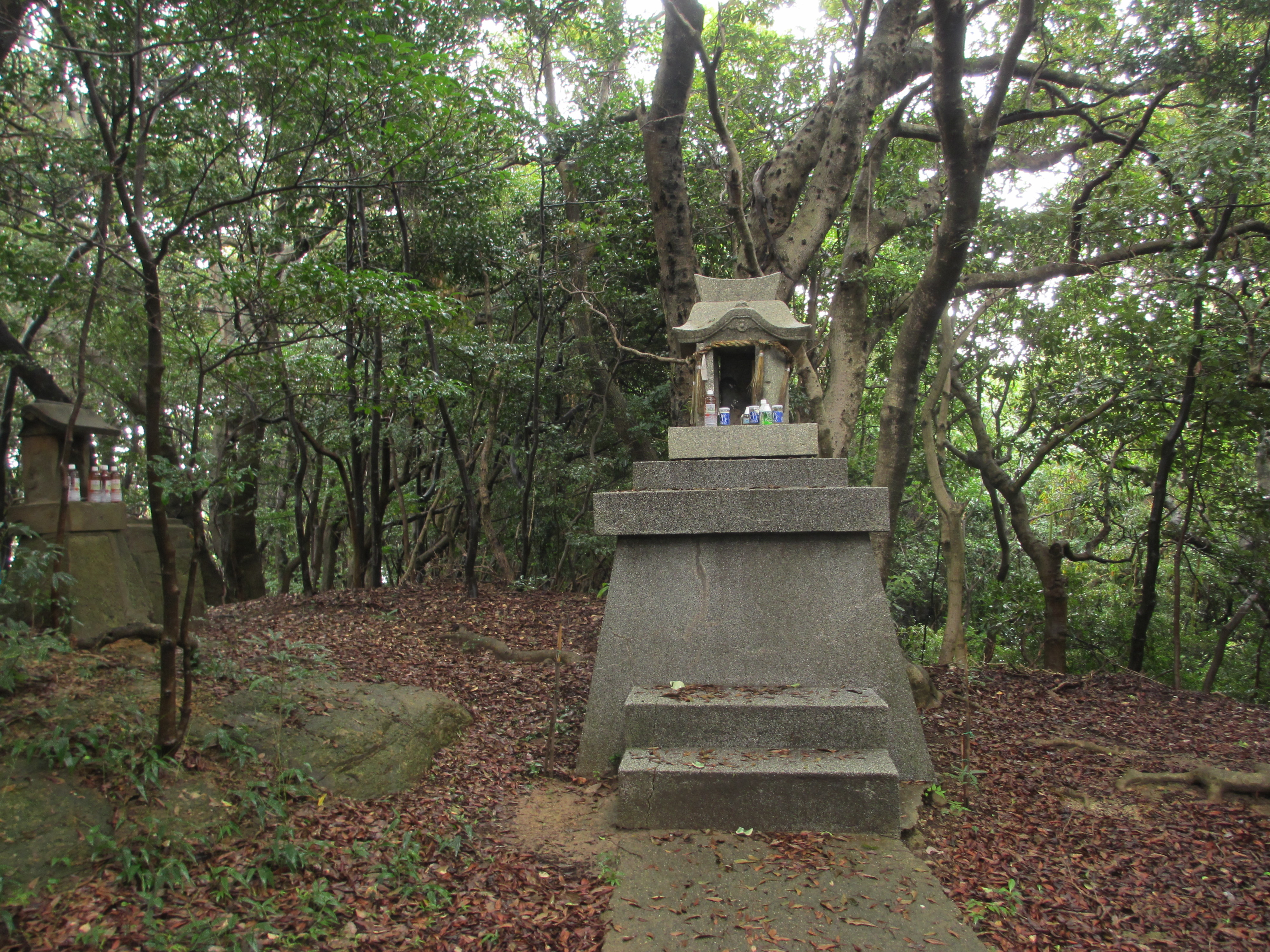 遠賀郡芦屋町山鹿33折尾駅ないし水巻駅山鹿城址から遠賀川上り大君交差点山側